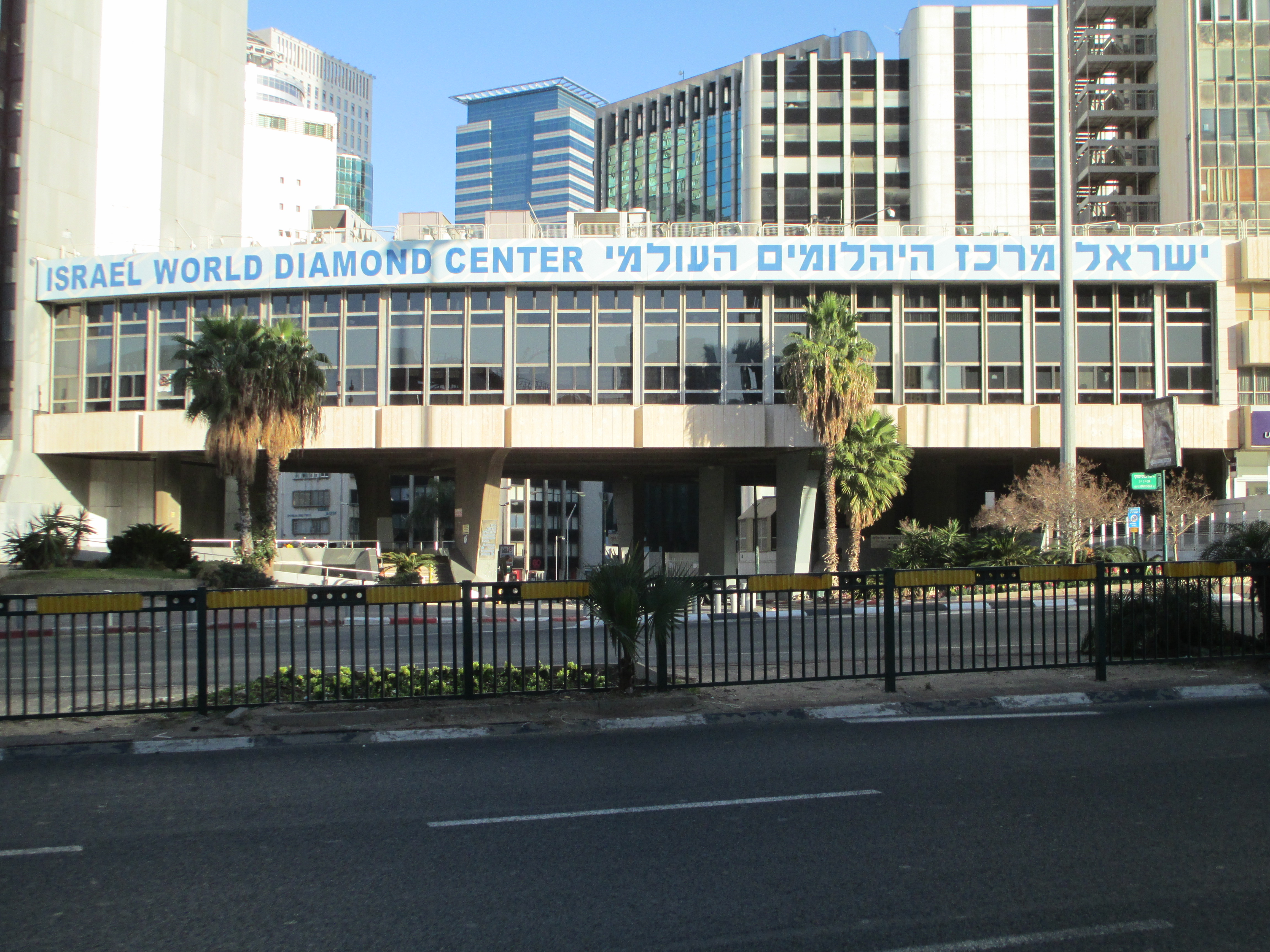 הכניסה למתחם הבורסה מדרך ז'בוטינסקי ברמת גן